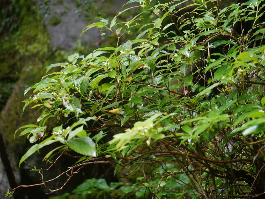 Platycorater arguta：バイカアマチャ 2014/08/05 和歌山県新宮市：Singu City, Wakayama pref. Japan